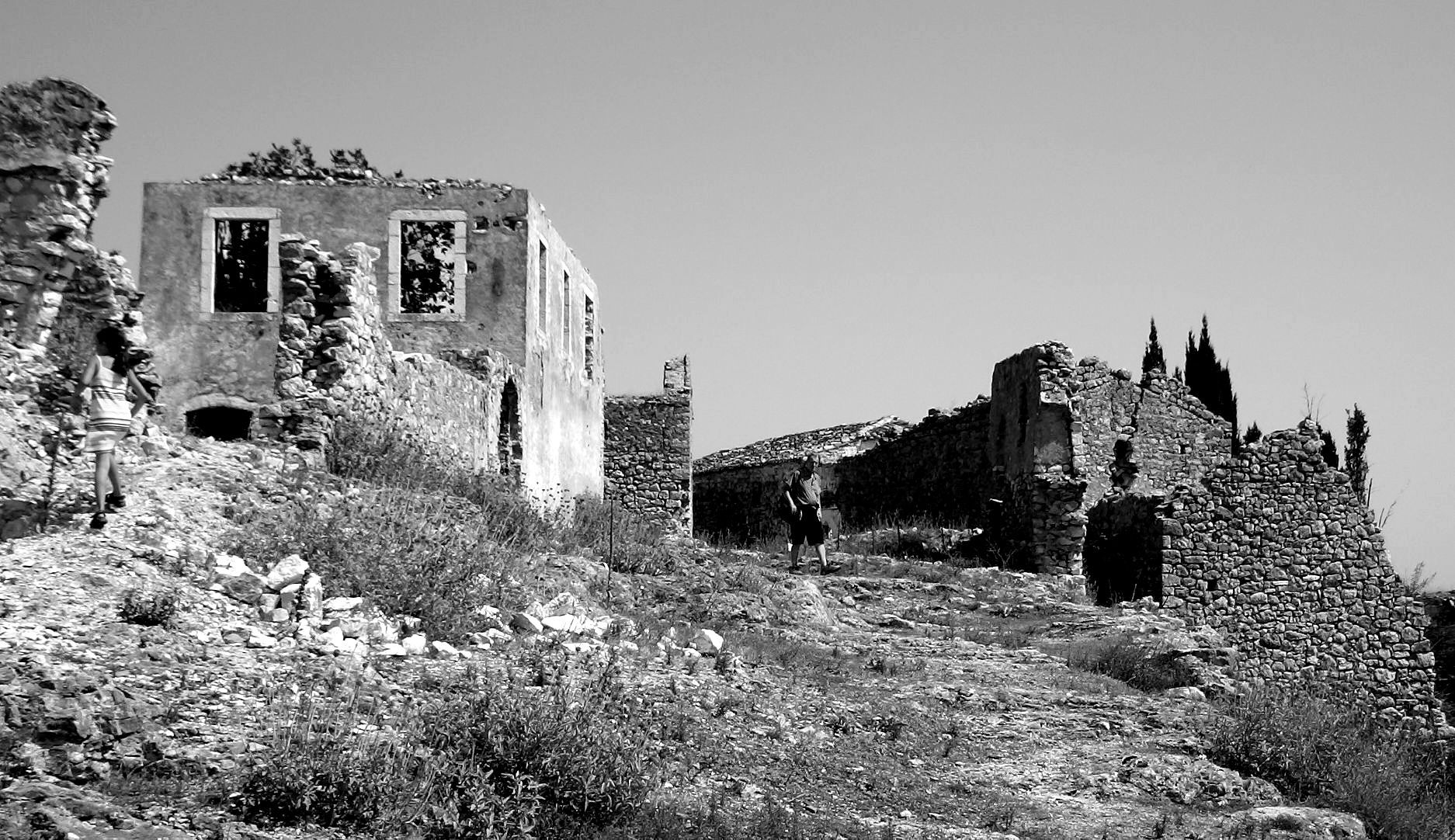 Ruinen in der Altstadt von Himara